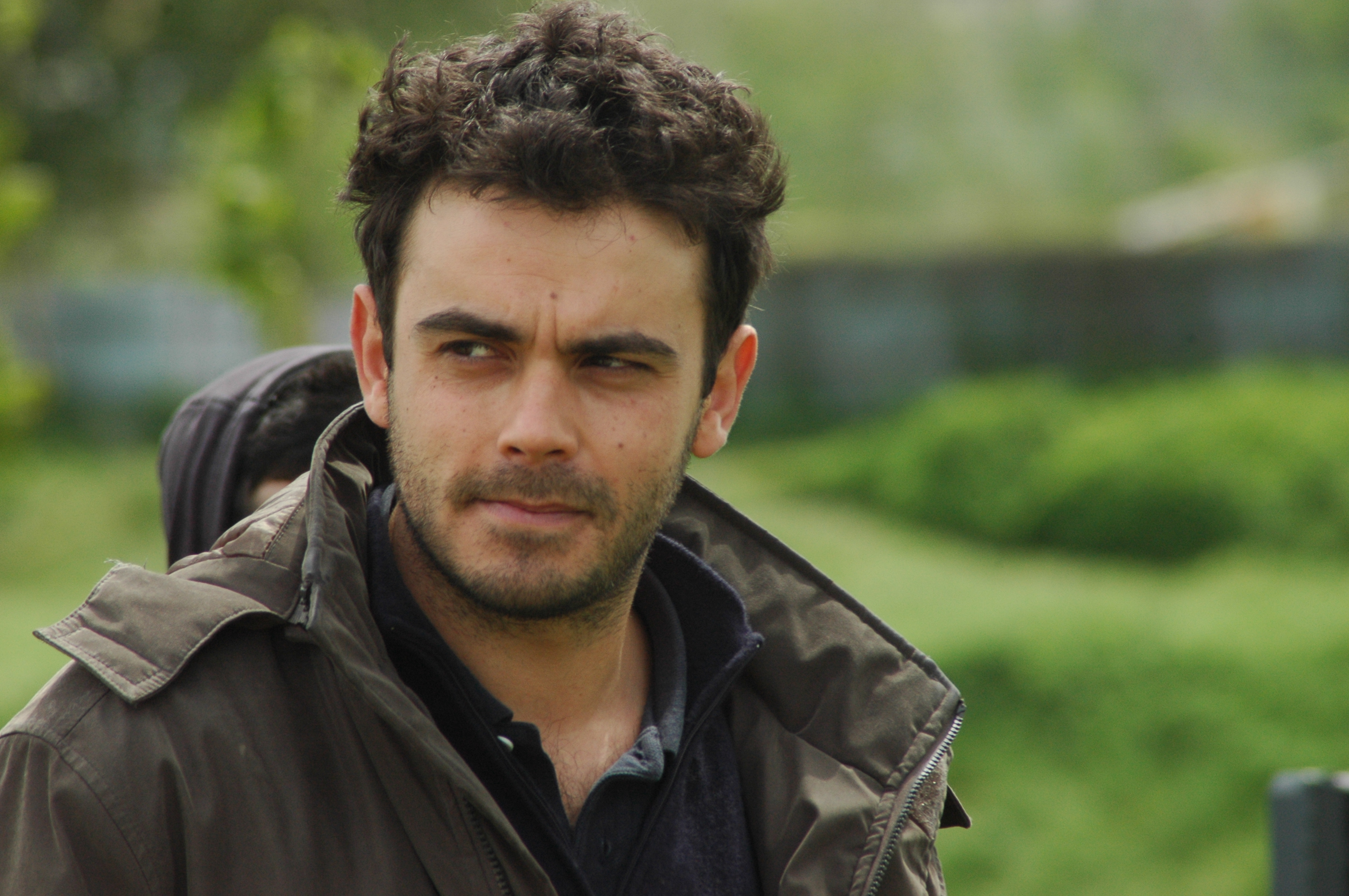 Federico Bondi